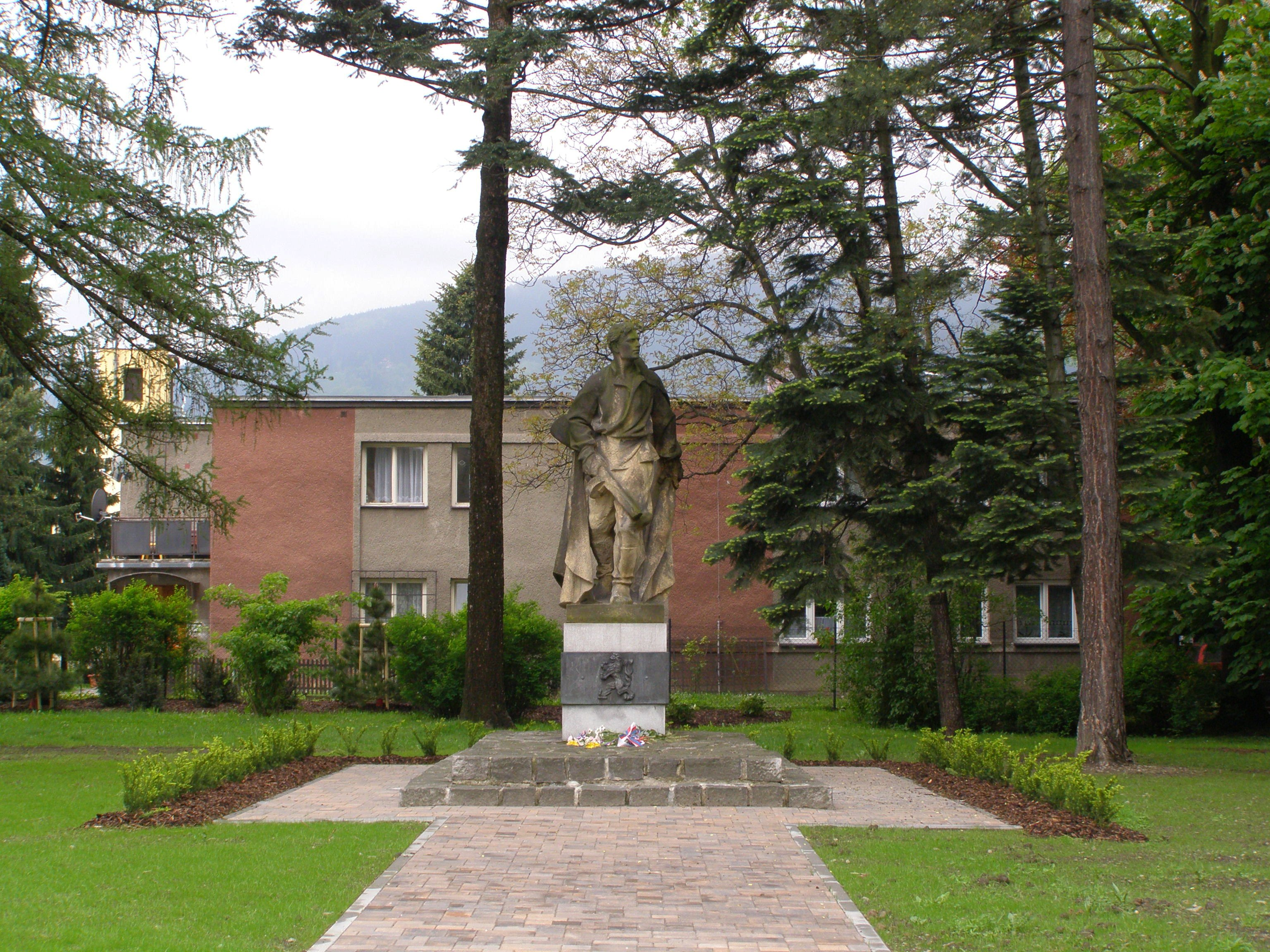 Frýdlant nad Ostravicí, ulice Padlých hrdinů, socha partyzána